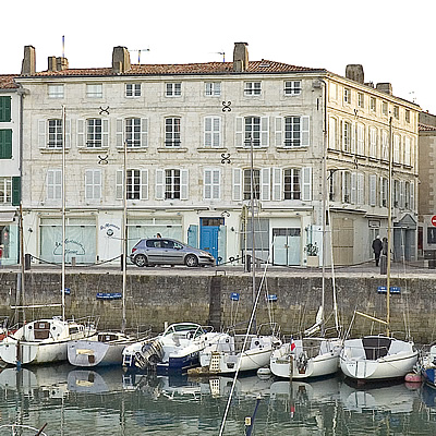 Maison familiale de Nicolas Baudin à Saint Matin de Ré - Île de Ré Photo issue de ma banque d'images personnelle Pep.per